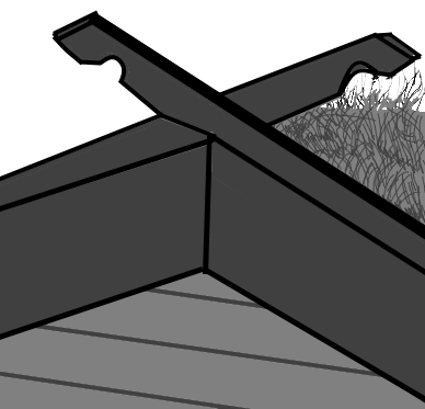 Décoration de pignon sur toiture végétale